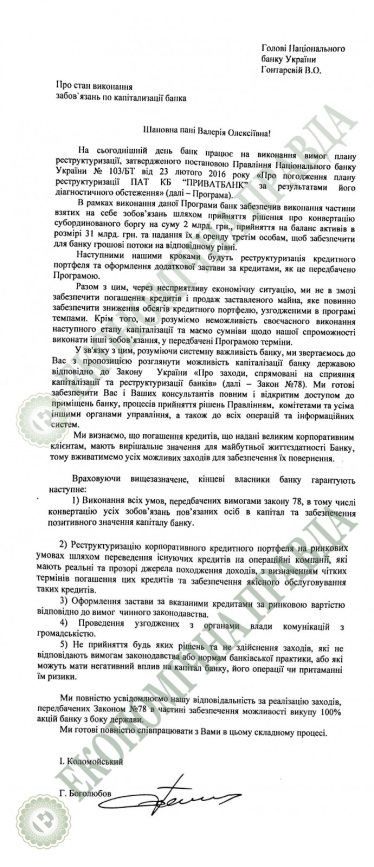 Лист І.Коломойського та Г.Боголюбова до НБУ